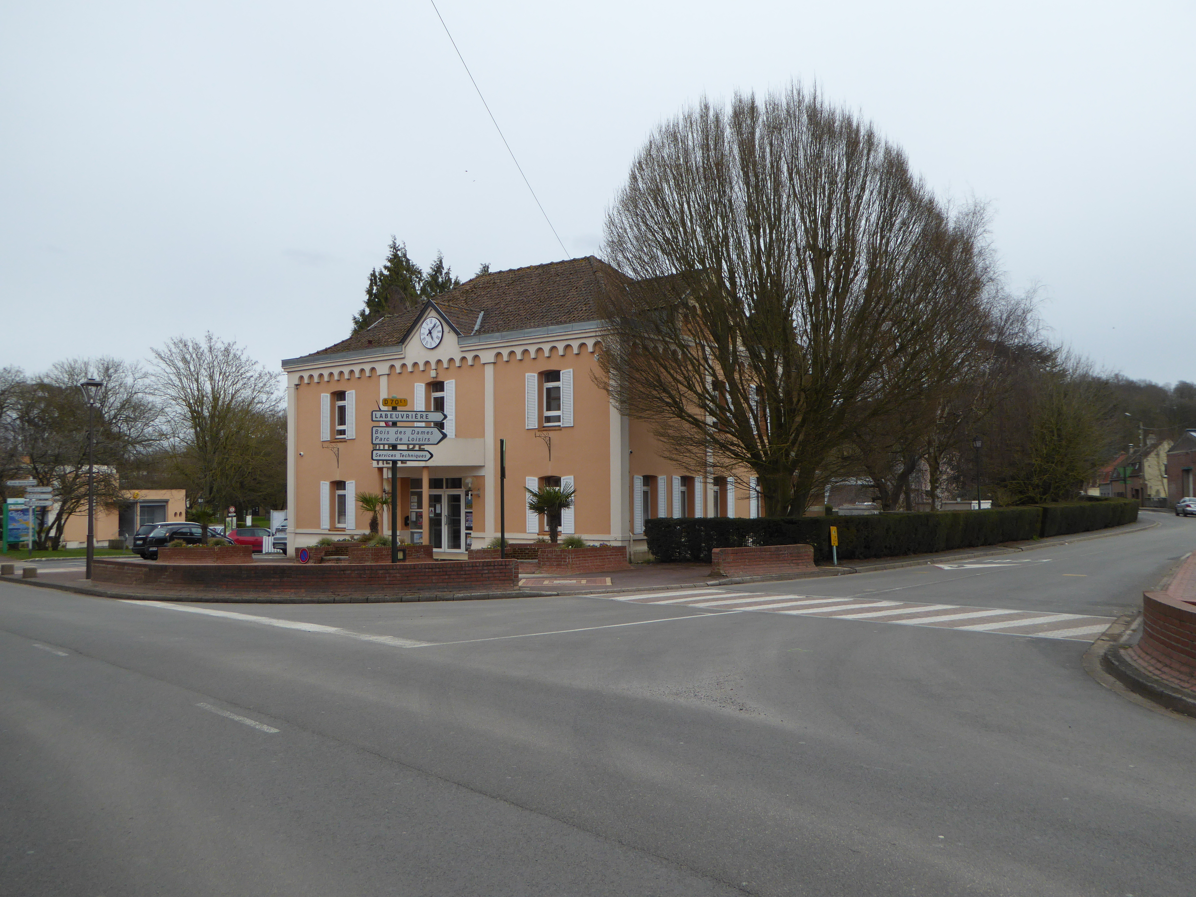 La mairie de Lapugnoy Nord (département français).